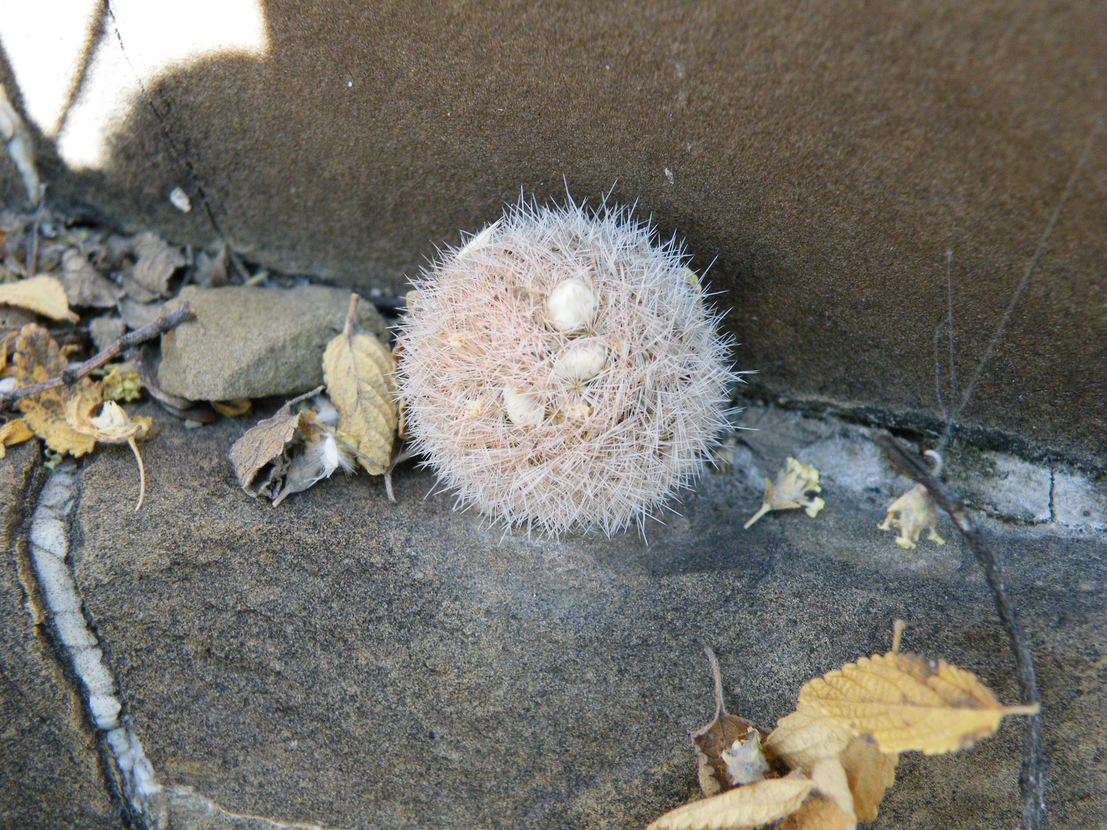 Parras de La fuente, Coahuila